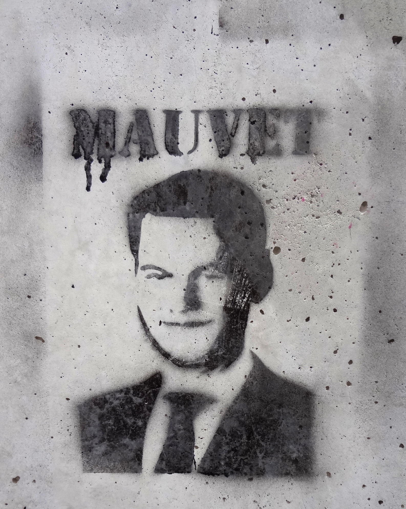 Graffiti au pochoir représentant Pierre Maudet, collège Calvin. Sur un mur récent à l'ouest des bâtiments dans le passage menant à la rue Verdaine.